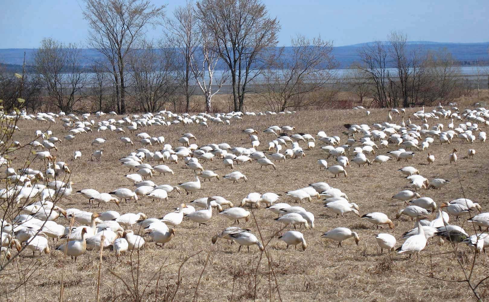 Anser caerulescens